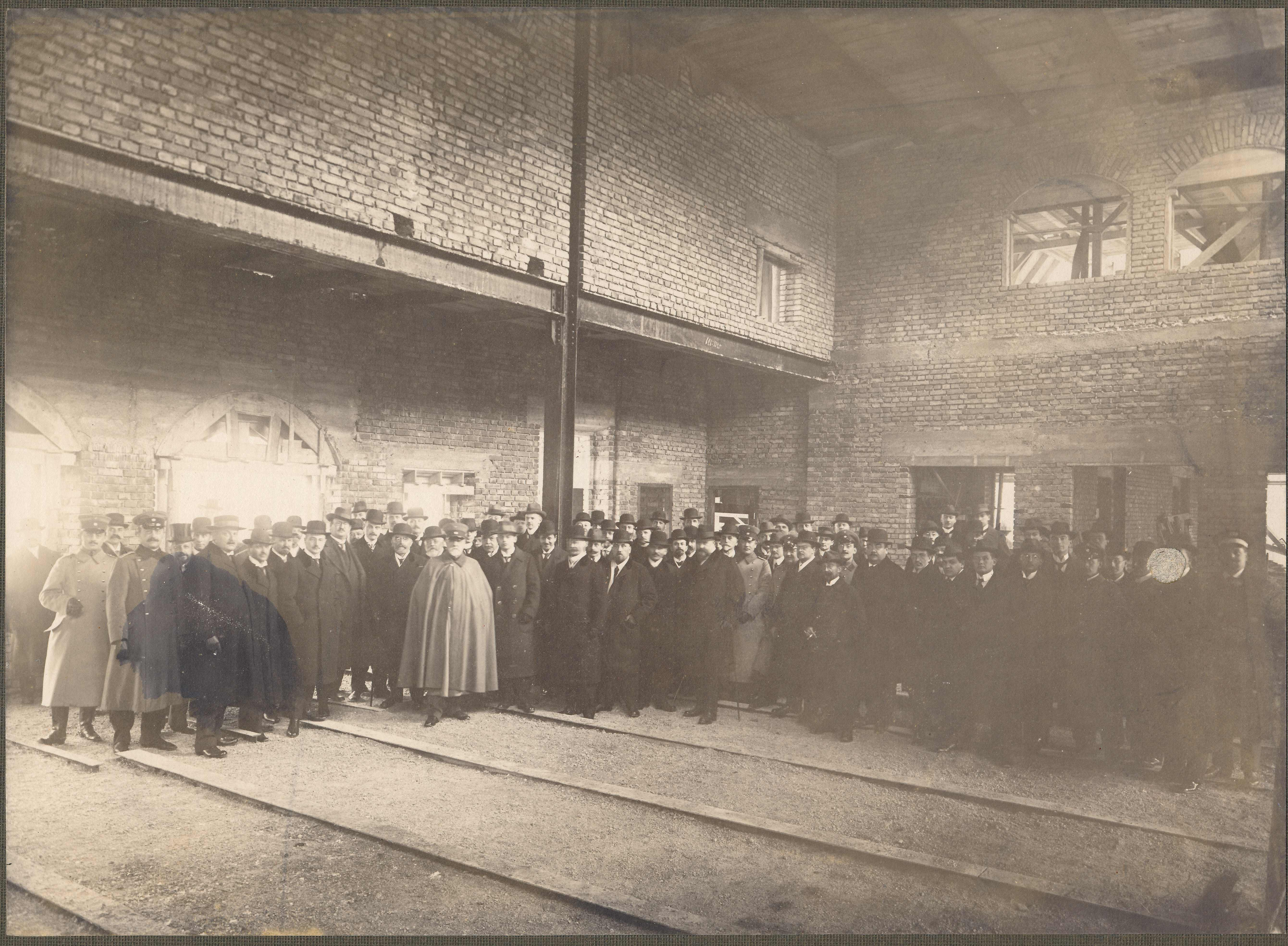 Großer Saal der Scholastika während der Bauarbeiten im Winter 1914